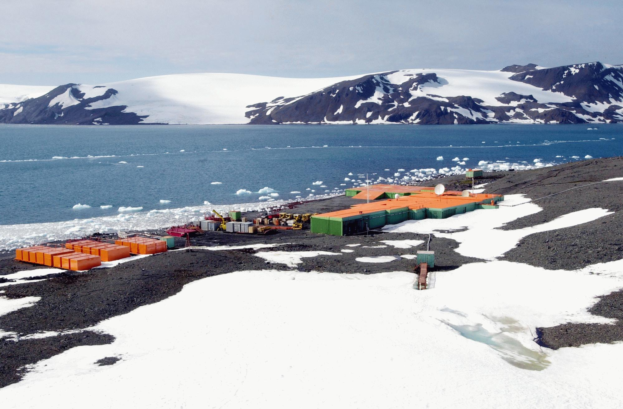 Brasilianische Antarktikbasis „Comandante Ferraz“ auf der King-George-Insel Estação Antártica "Comandante Ferraz" na ilha do Rei George Brazilian antarctic base "Comandante Ferraz", located at King George Island.